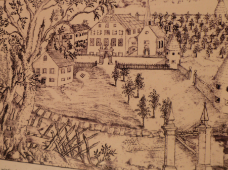 Schlossbauerngut_historische Ansicht